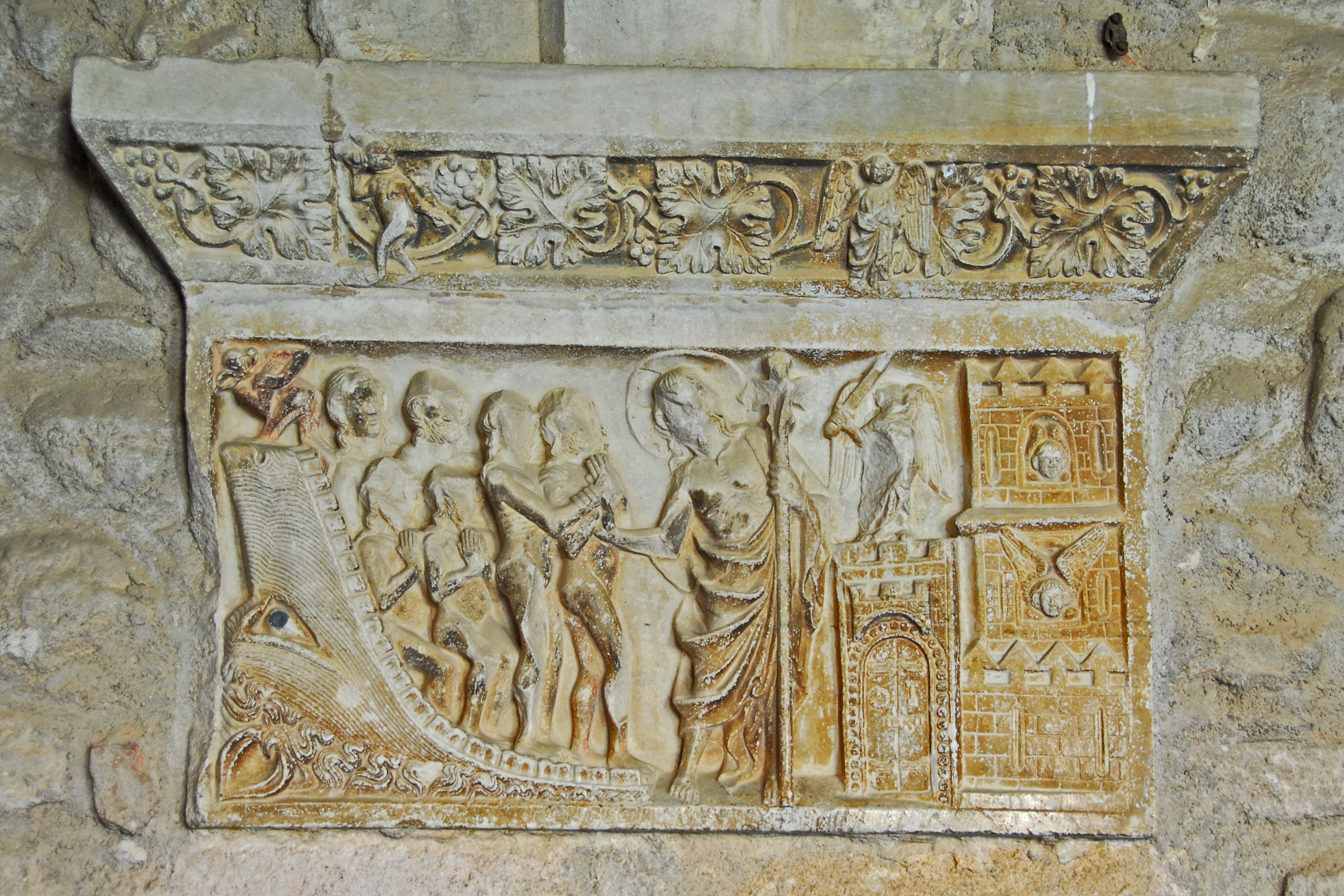 Ste-Eulalie-et-Ste-Julie_d’Elne, Tafel unter Gewölbe-Rippenansatz, Höllenfahrt